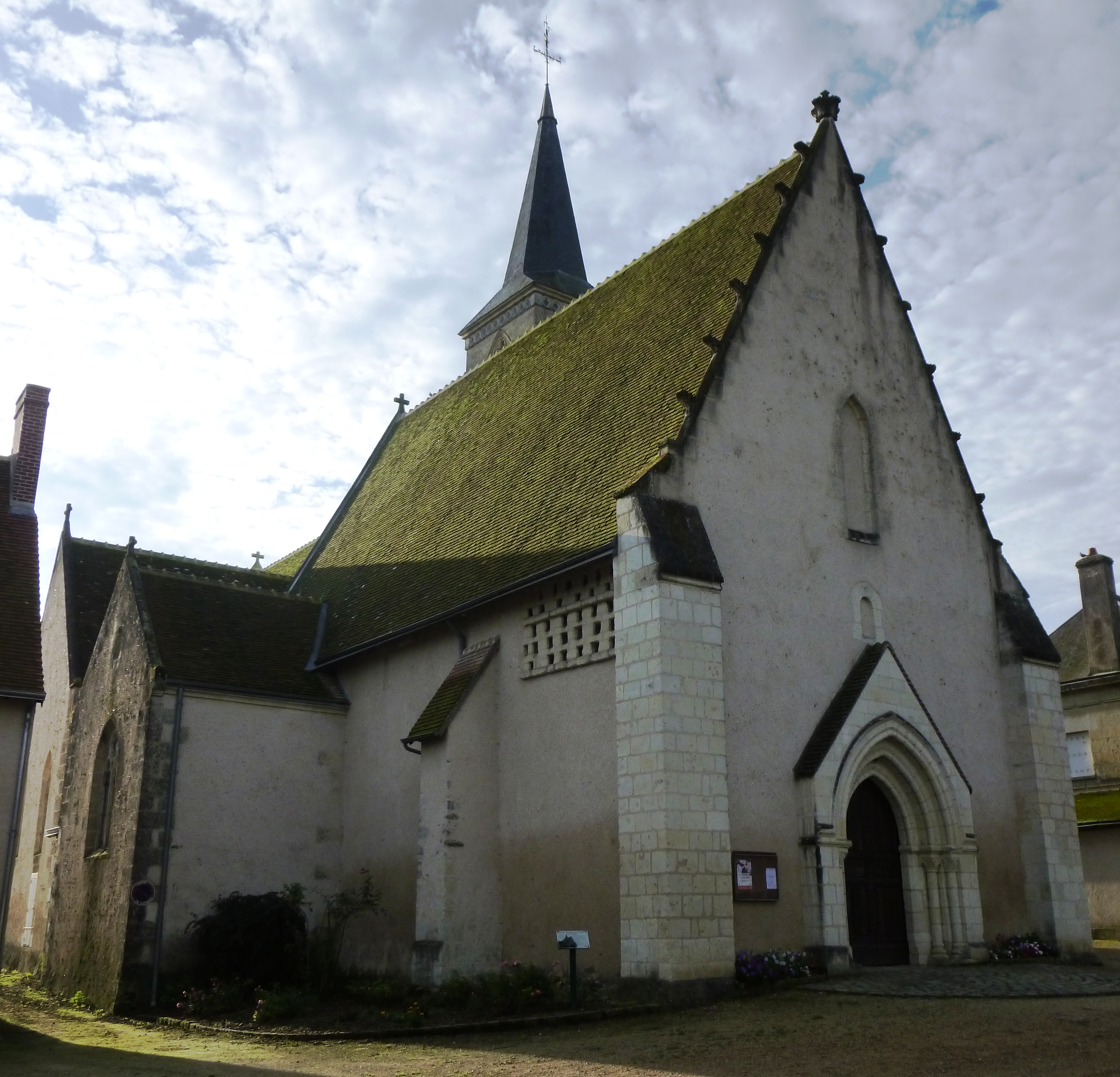 Eglise Saint Pierre et Saint Paul de Ternay .Pigeonnier extérieur incrusté mur nord , unique dans la région .